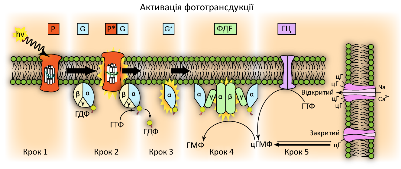 Фототрансдукція (перетворення світлового стимулу у нервовий імпульс) в паличці.